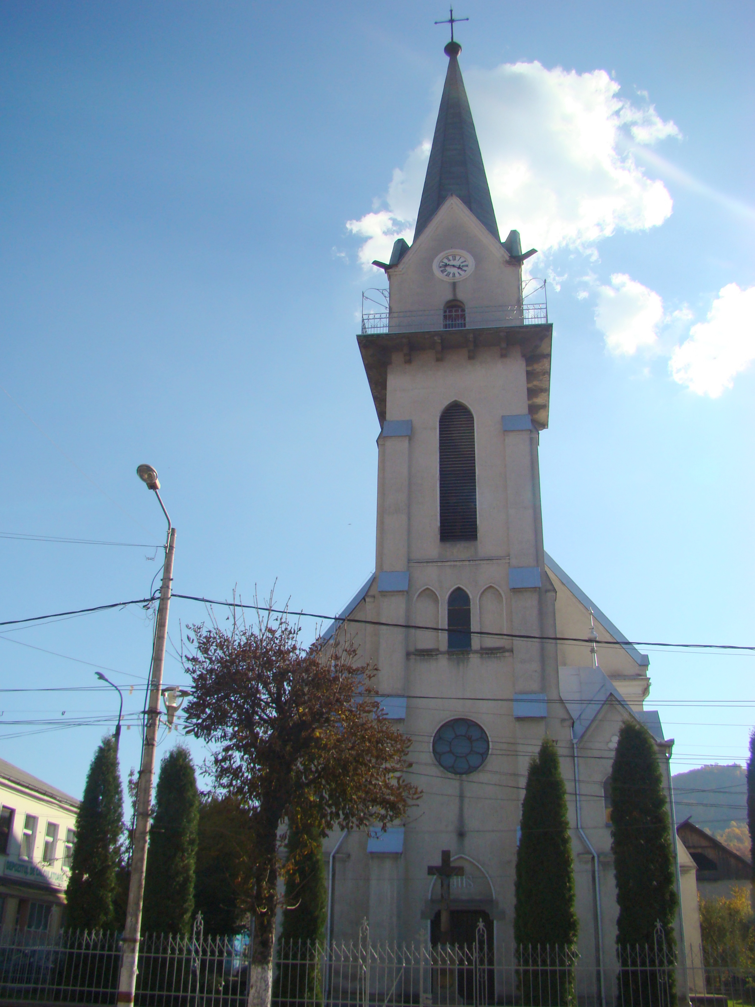 Biserica romano-catolică "Ioan și Ana", oraș Vișeu de Sus